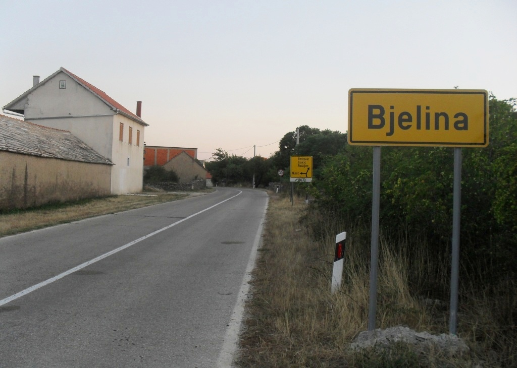 Улаз у Бјелину из правца Кистања, Буковица, Далмација.